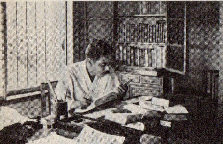 書斎に聖書研究をする内村鑑三